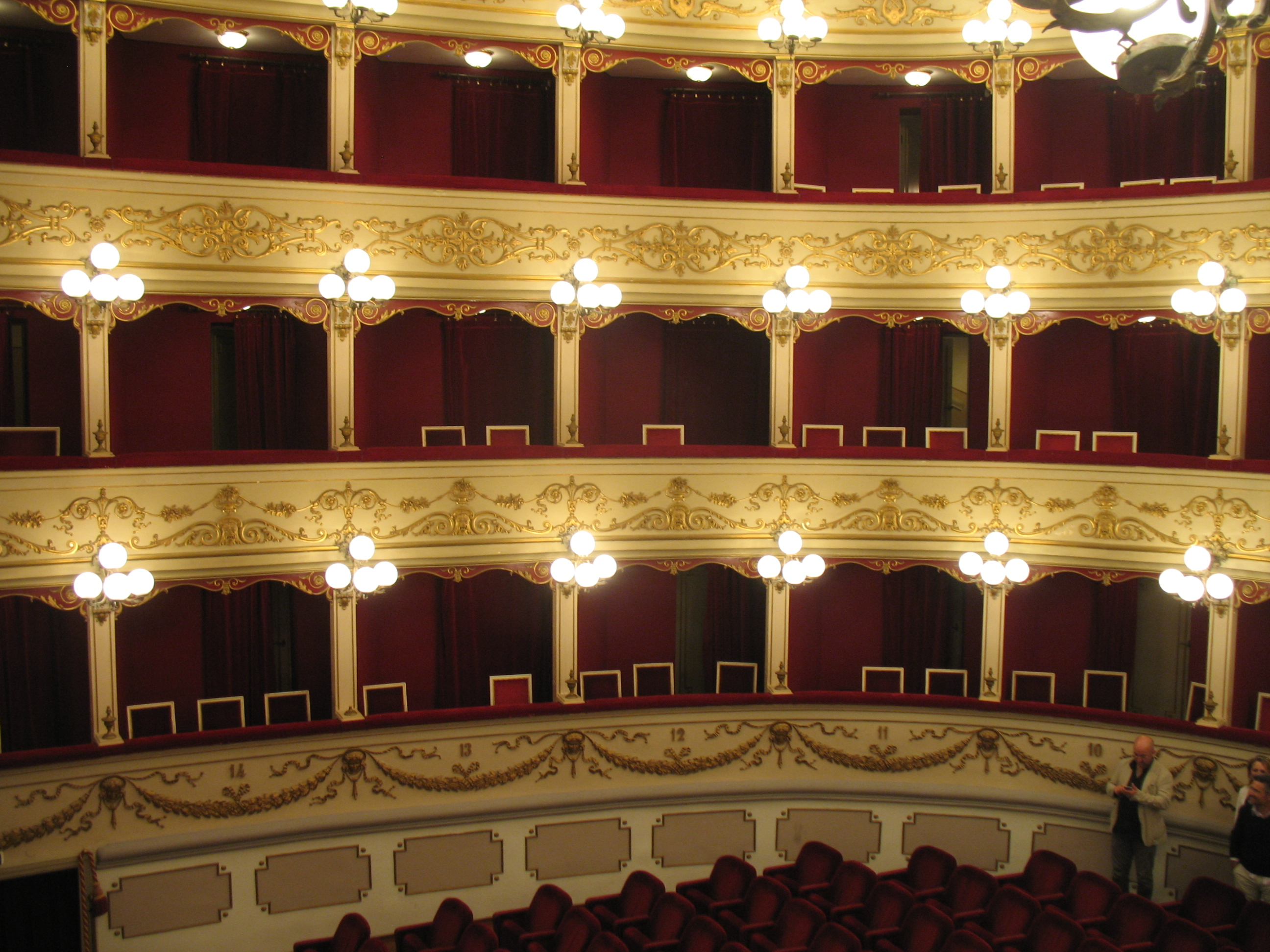 Spalti del Teatro Marrucino a Chieti